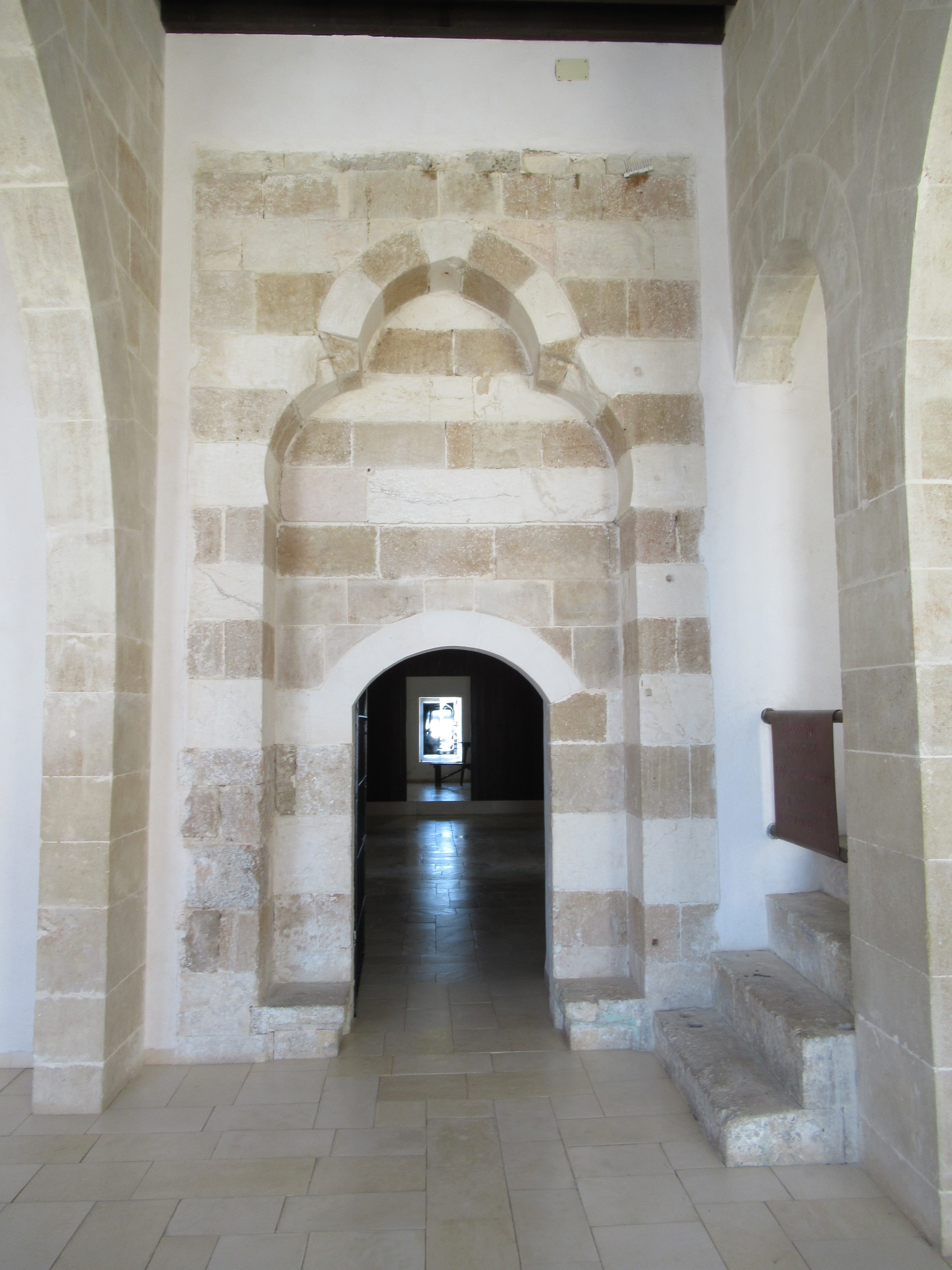 מוזיאון אסירי המחתרות בעכו הוא מוזיאון הנצחה לחברי המחתרות העבריות בתקופת המנדט הבריטי, שנכלאו בכלא עכו. המוזיאון משוכן במבצר עכו אשר נבנה בתקופה העות'מאנית. המבצר שימש בתקופת השלטון העות'מאני כבסיס צבאי, מעון מושל עכו ואף בית סוהר.